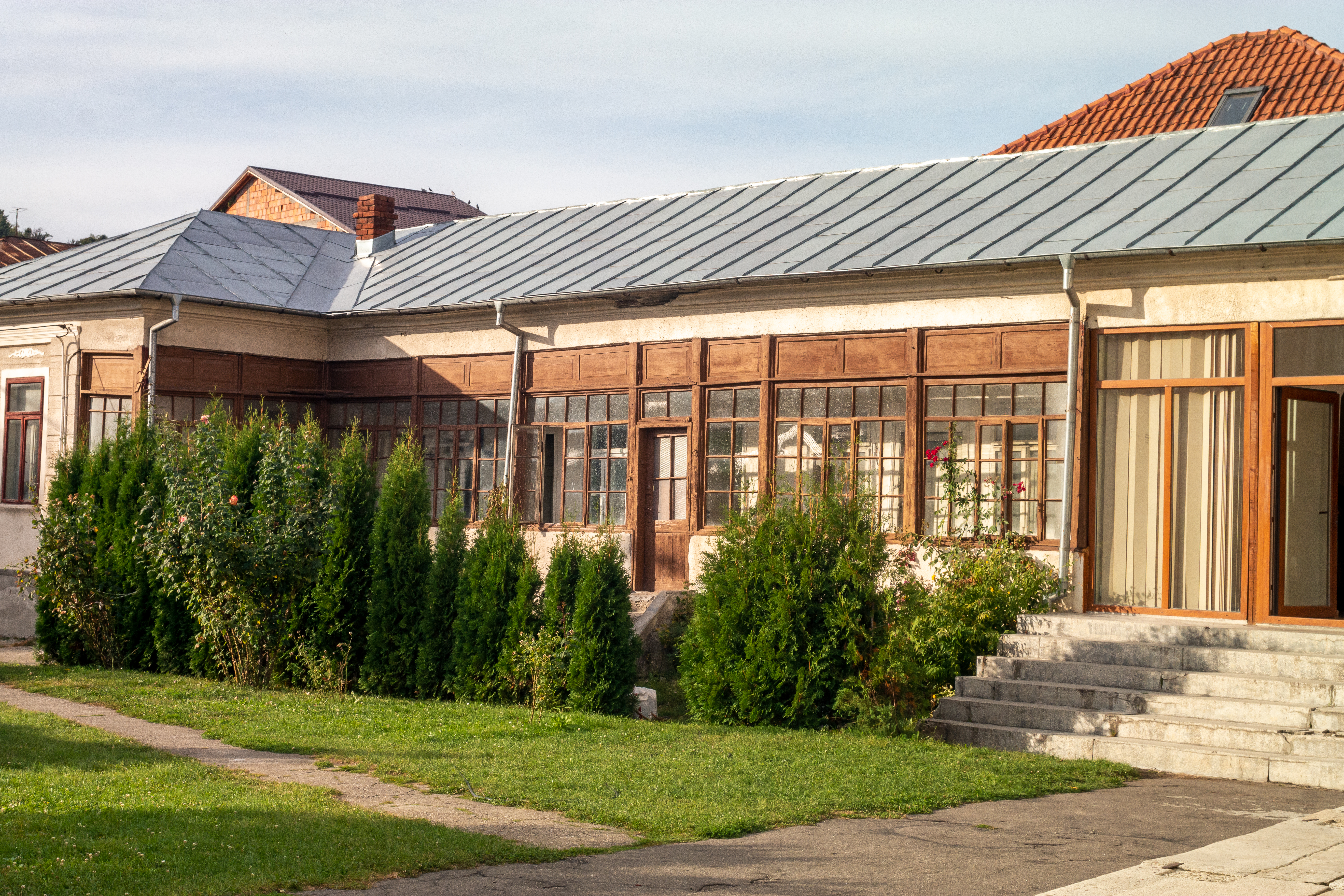 Casă parohială a bisericii "Sf Nicolae" - Domnească, Câmpulung. Clădirea este deosebită prin așezarea la nivel apropiat solului a elementului fundamental al plasticii casei muscelene: prispa. Aceasta este dezvoltată pe toată lungimea construcției și închisă cu tâmplărie fină și sticlă, generând o surprinzătoare imagine de urbanitate, specifică tendinței arhitecturale a sfârșitului de secol XIX. 02